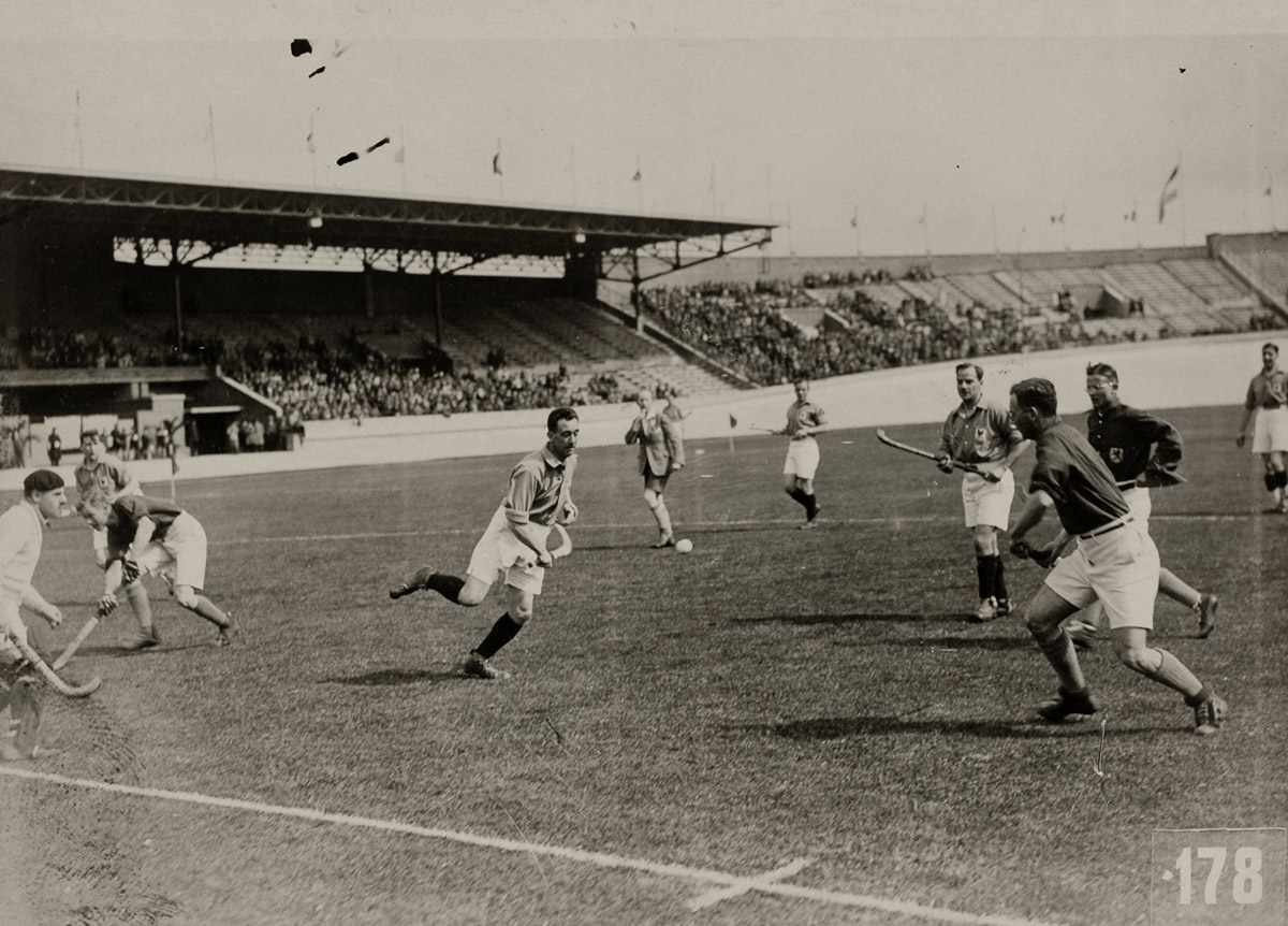 Opname uit de hockeywedstrijd Nederland-Frankrijk (5-0).